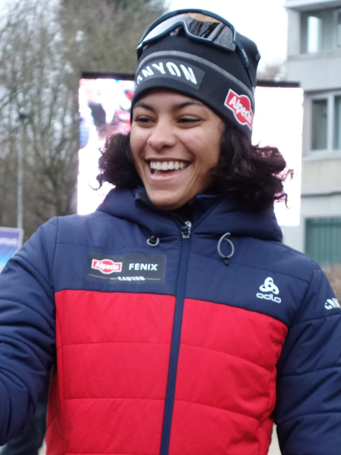 Ceylin del Carmen Alvarado (winnares) na de finish van de tweede editie van de Brussels Universities Cyclocross (DVV Verzekeringen Trofee) op de campus van de VUB & ULB op zondag 5 januari 2020.